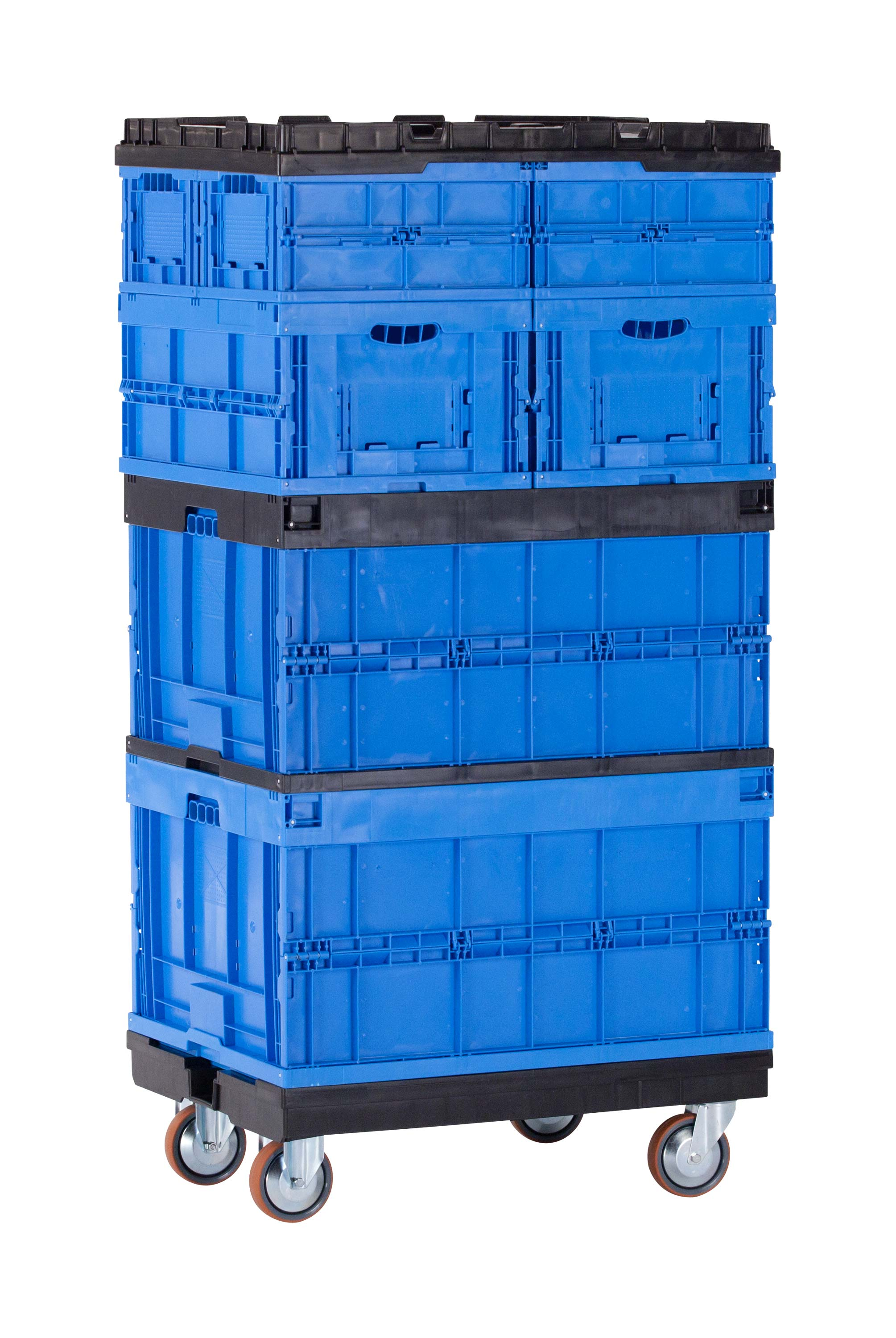 Versandturm mit Faltbehältern im befülltem Zustand.